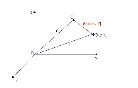 Creato da Gugliotta Vincenzo - File